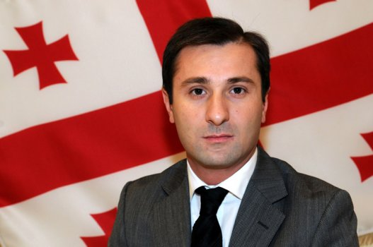 ზურაბ არსოშვილი